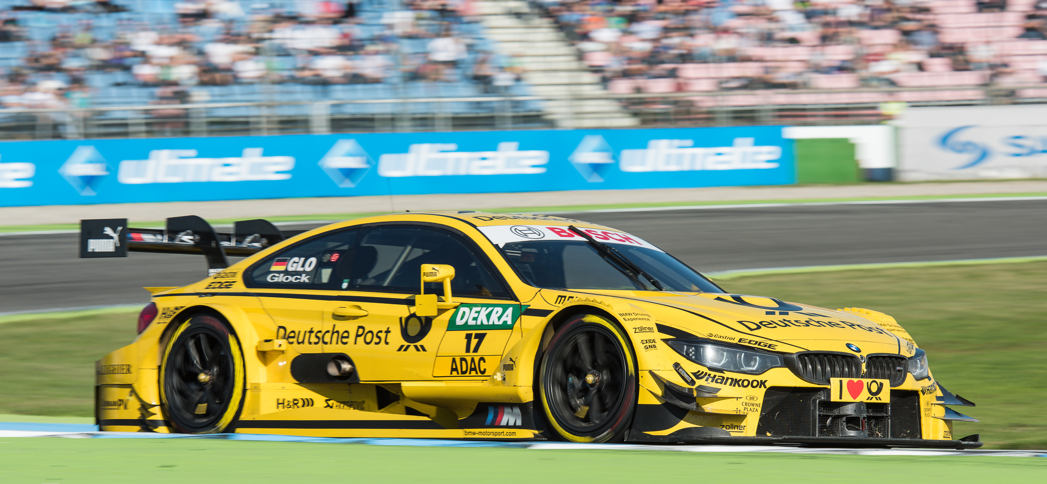 DTM,Deutsche Post BMW M4 DTM,Deutsche Tourenwagen Masters,Hockenheimring,MTEK GmbH,Motorsport,Timo Glock